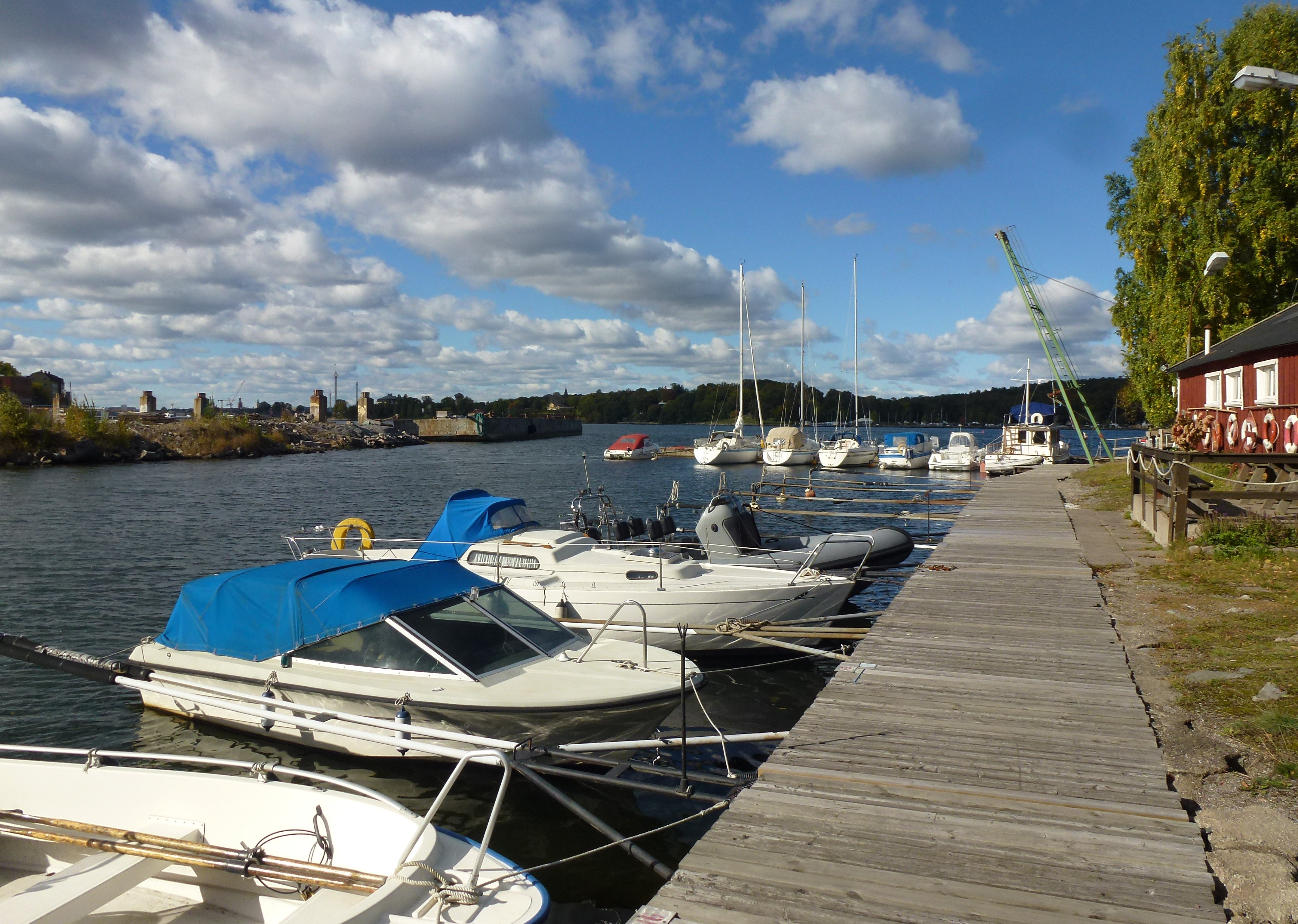 Sista resten av Hästholmssundet vid Kvarnholmen